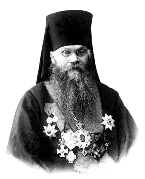 Архиепископ Тихон (Никаноров)